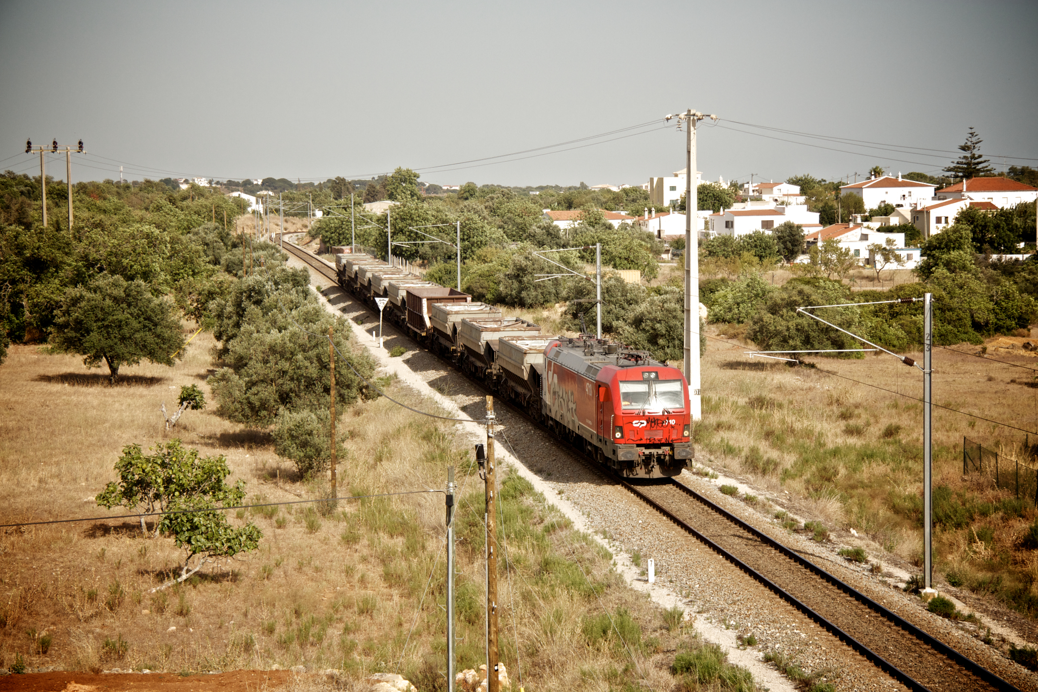 Tipo: Comboio de Transporte de Areia (material vazio) 62994 [Loulé - Poceirão] Local: Ferreiras [Linha do Algarve , PK 307] Data e hora: 2 de Julho de 2011 [17h51] Material: Locomotiva 4710 + 9 vagões Transfesa Faoos